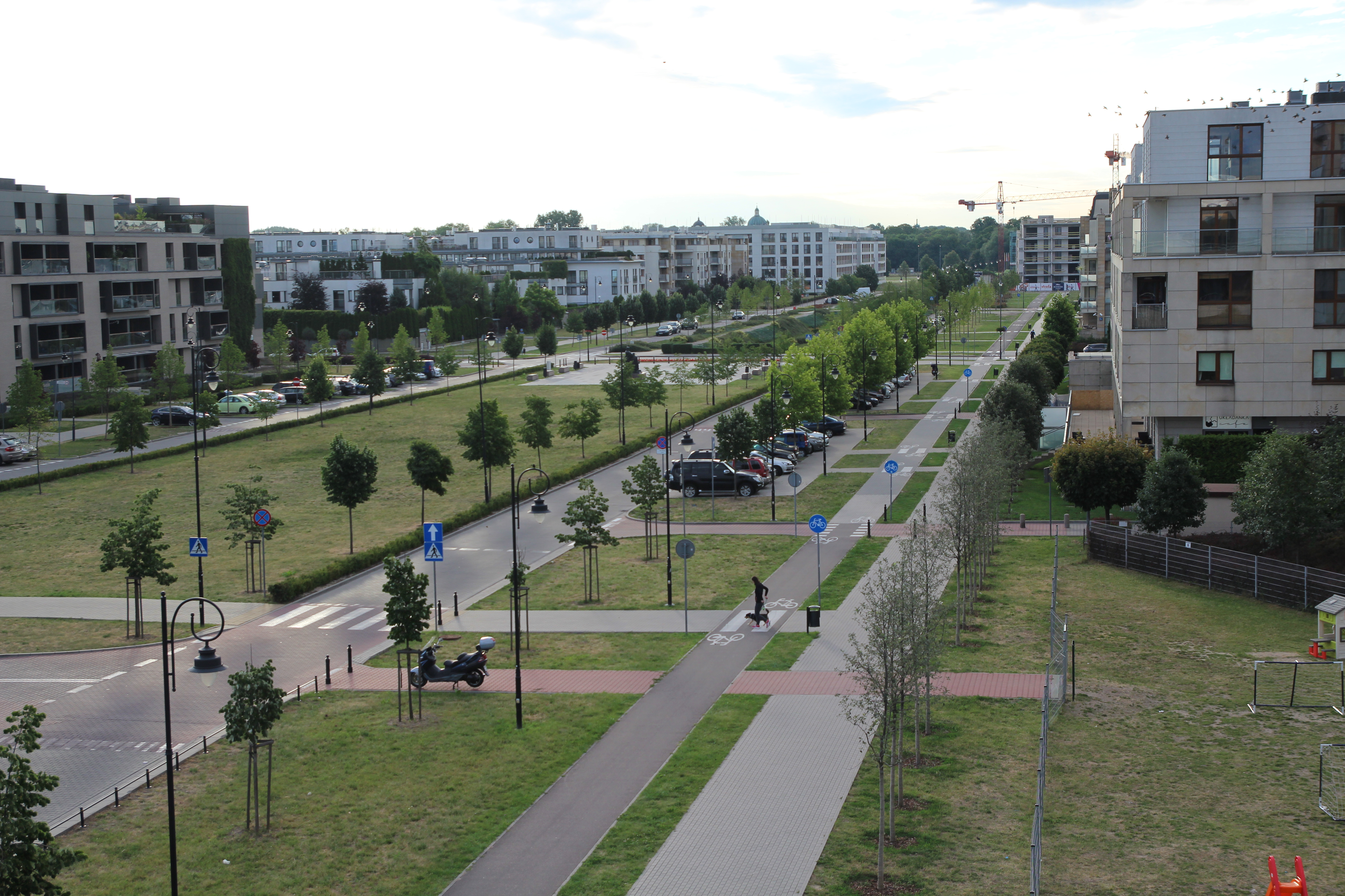 Oś Królewska from Alto Wilanów